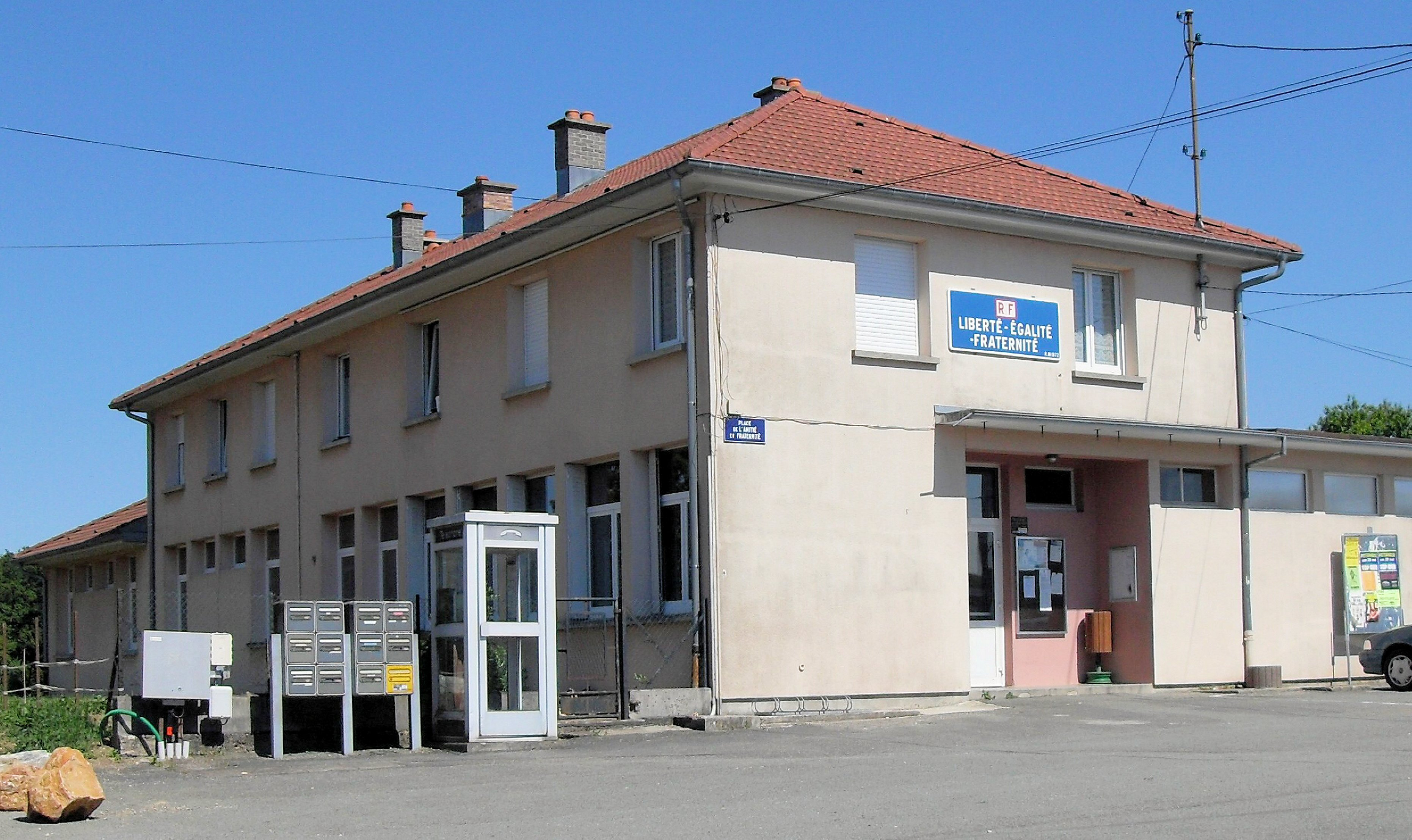 La mairie de Lepuix-Neuf